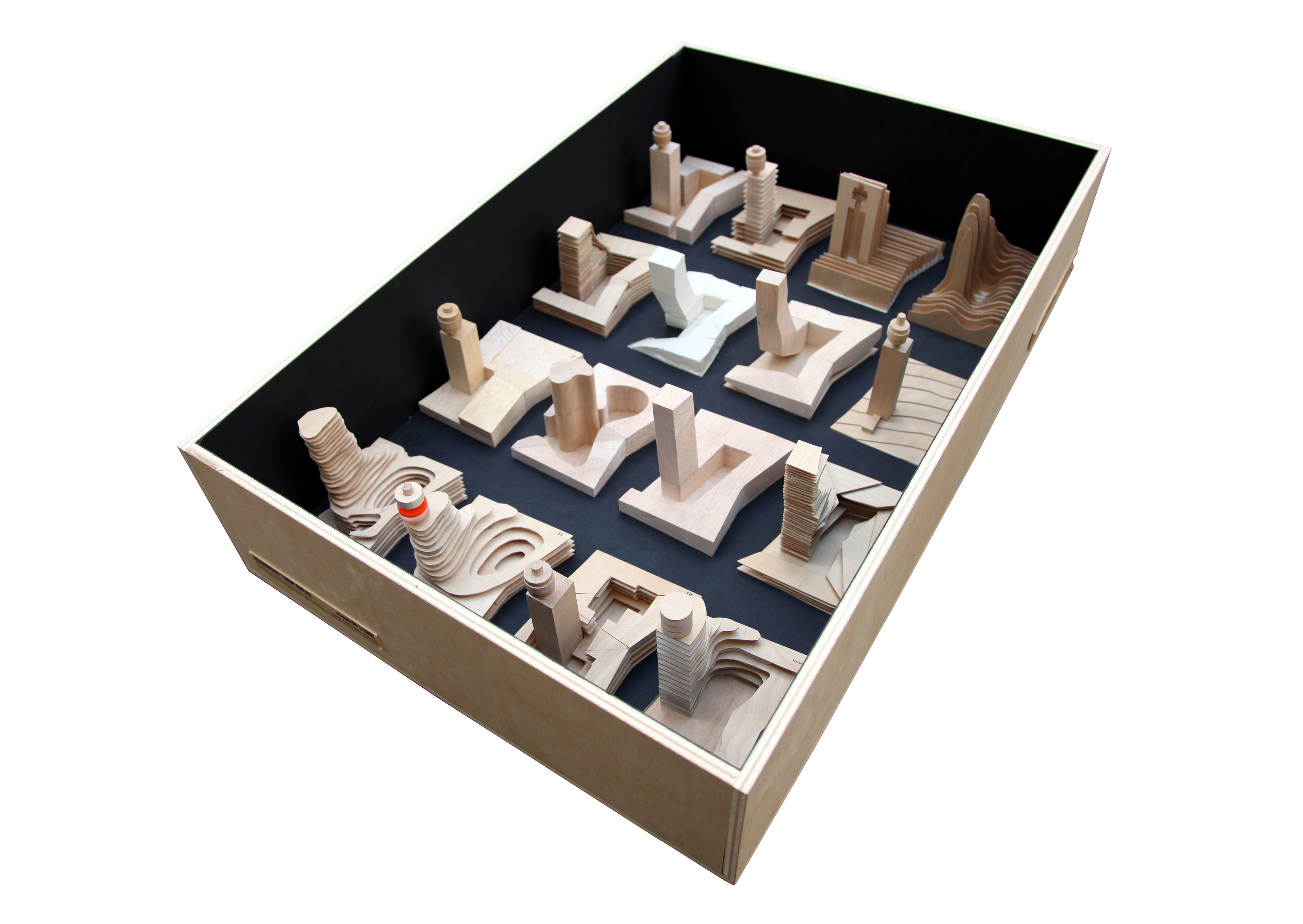 Model types Henninger Turm Frankfurt Meixner Schlüter Wendt Architekten